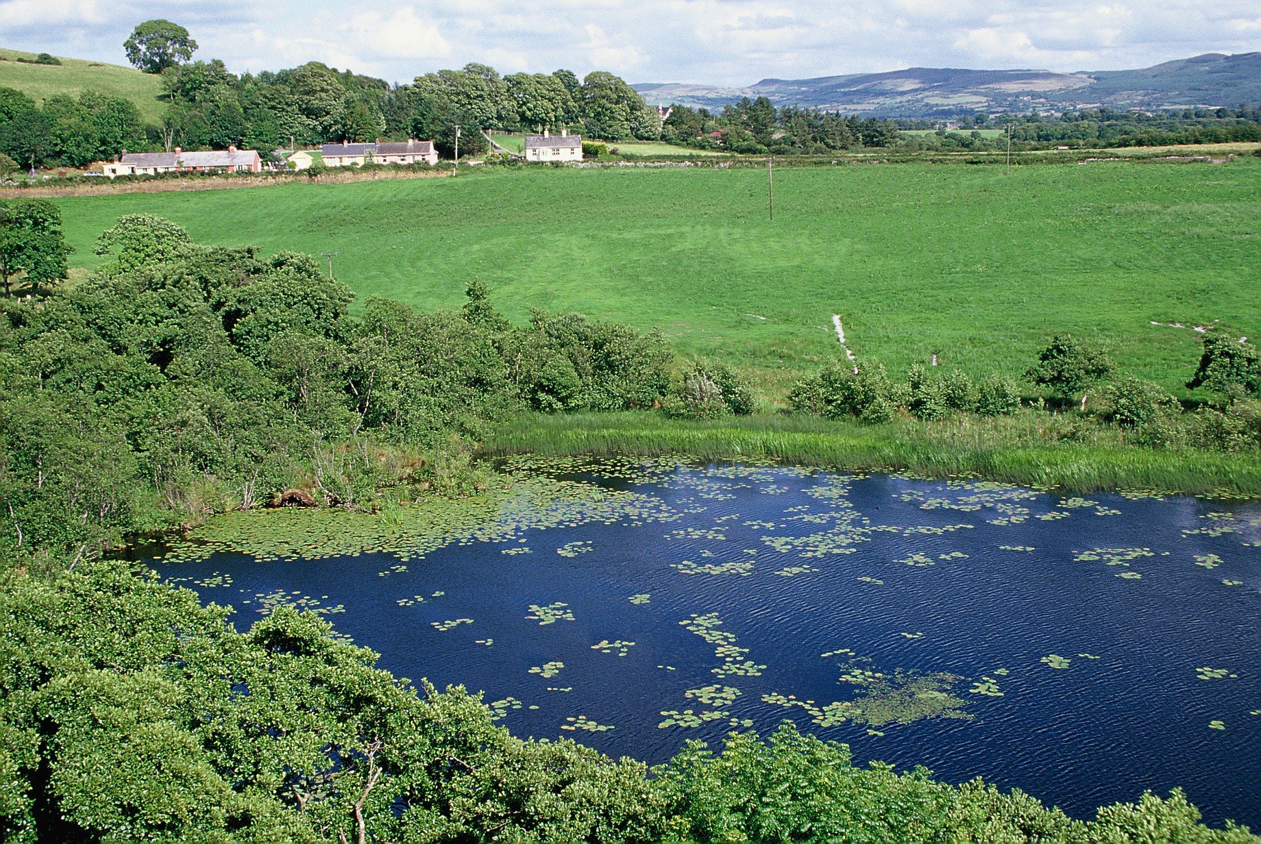 Craggaunowen, Blick vom Wohnturm